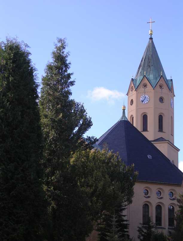 Kirche in Lichtenberg (Landkreis Kamenz, Sachsen)